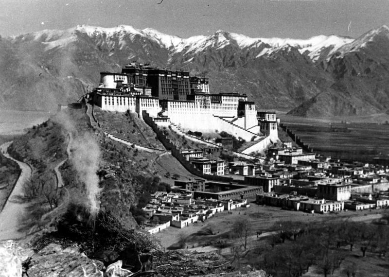 Lhasa, der Potala, vom Medizinberg aus gesehen